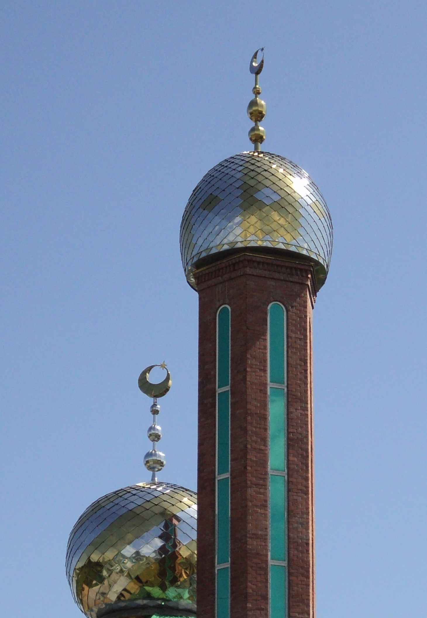 Мечеть в Находке